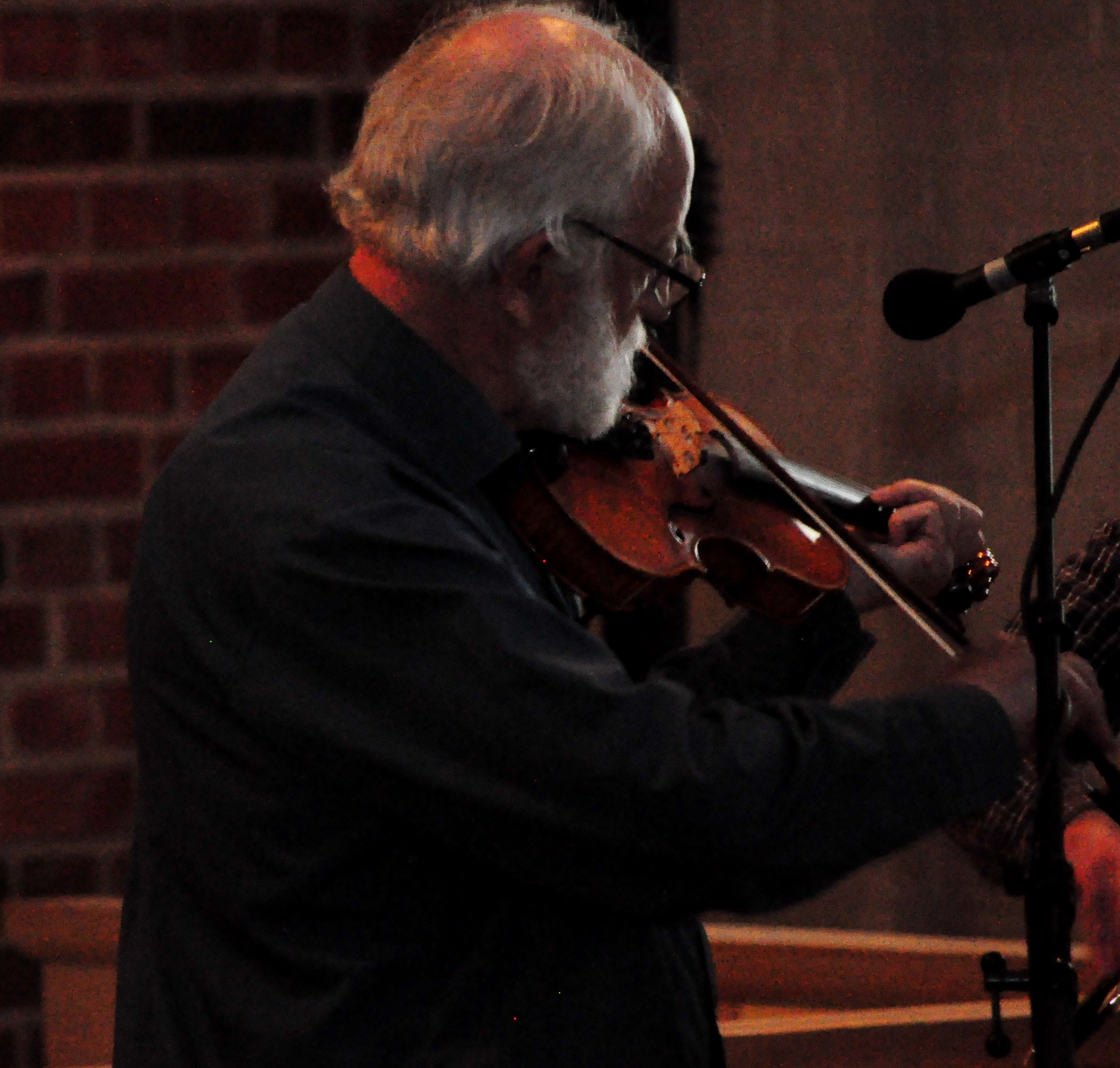 Bengt Löfberg vid en konsert i Östra Eds kyrka.